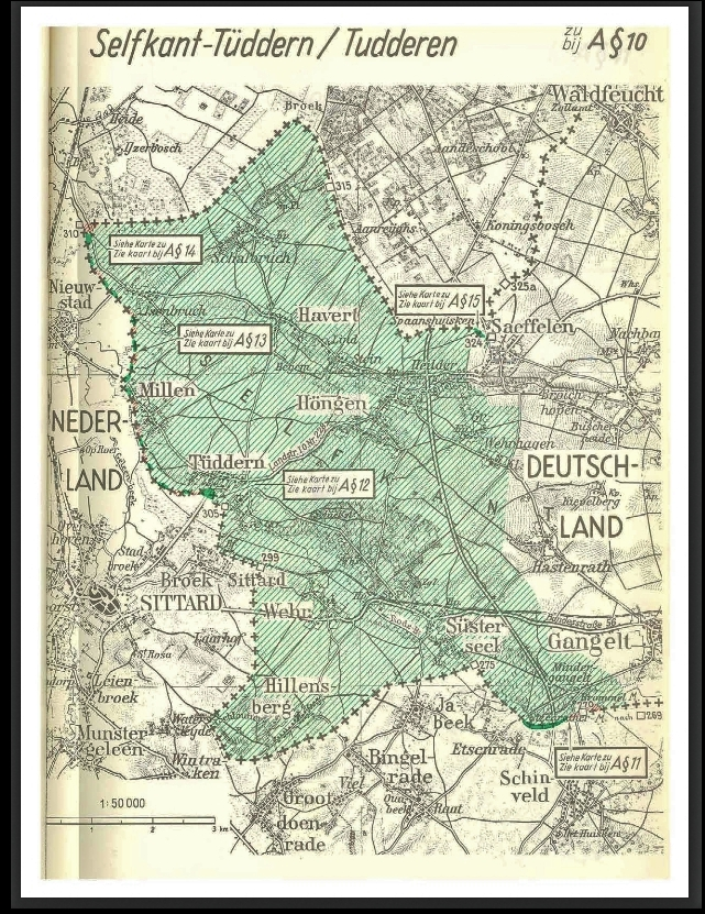 Lagekarte des Selfkants in der Zeit der niederländischen Annexion von 1948 bis 1963